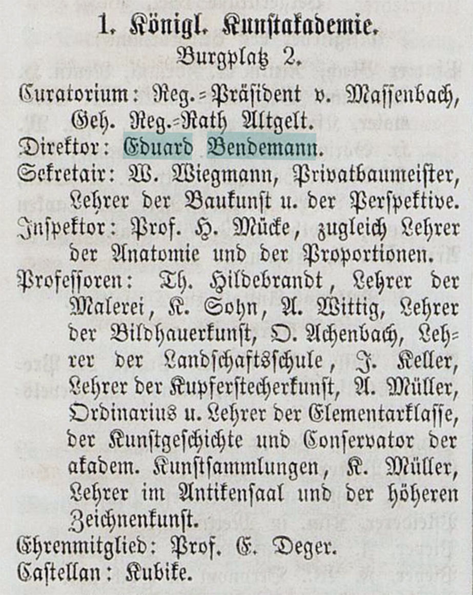 Königliche Kunstakademie, Burgplatz 2, Düsseldorf – Kuratorium: Regierungspräsident Leo von Massenbach und Geheimer Regierungsrat Hermann Altgelt. Direktor: Eduard Bendemann. Sekretär: W. (vermutl. Rudolf) Wiegmann, Privatbaumeister, Lehrer der Baukunst u. der Perspektive. Inspektor: Prof. H. Mücke, zugleich Lehrer der Anatomie und der Proportionen. Professoren: Th. Hildebrandt, Lehrer der Malerei; K. Sohn; A. Wittig, Lehrer der Bildhauerkunst; O. Achenbach, Lehrer der Landschaftschule; J. Keller, Lehrer der Kupferstecherkunst; A. Müller, Ordinarius u. Lehrer der Elementarklasse, der Kunstgeschichte und Konservator der akadem. Kunstsammlungen; K. Müller, Lehrer im Antikensaal und der höheren Zeichenkunst. Ehrenmitglied: Prof. E. Deger. Kastellan: Kubike. aufgeführt in Adreßbuch der Oberbürgermeisterei Düsseldorf 1863